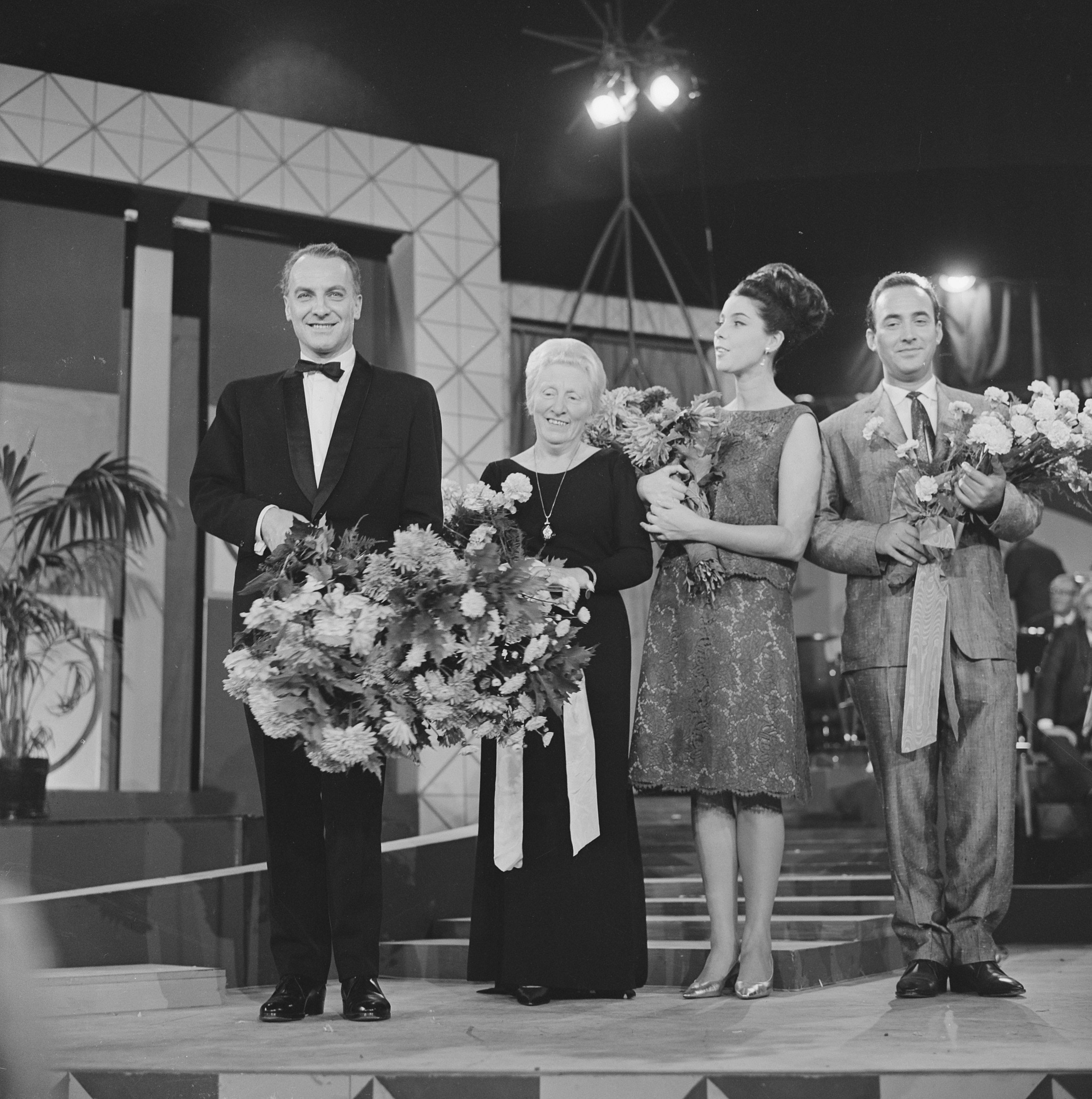 Grand Gala du Disque populair in Kurhaus te Scheveningen. Van links naar rechts: Wim Sonneveld, Paula van Alphen, Corry Brokken en Jan Morks. Datum: 12 oktober 1963. Locatie:Scheveningen, Zuid-Holland